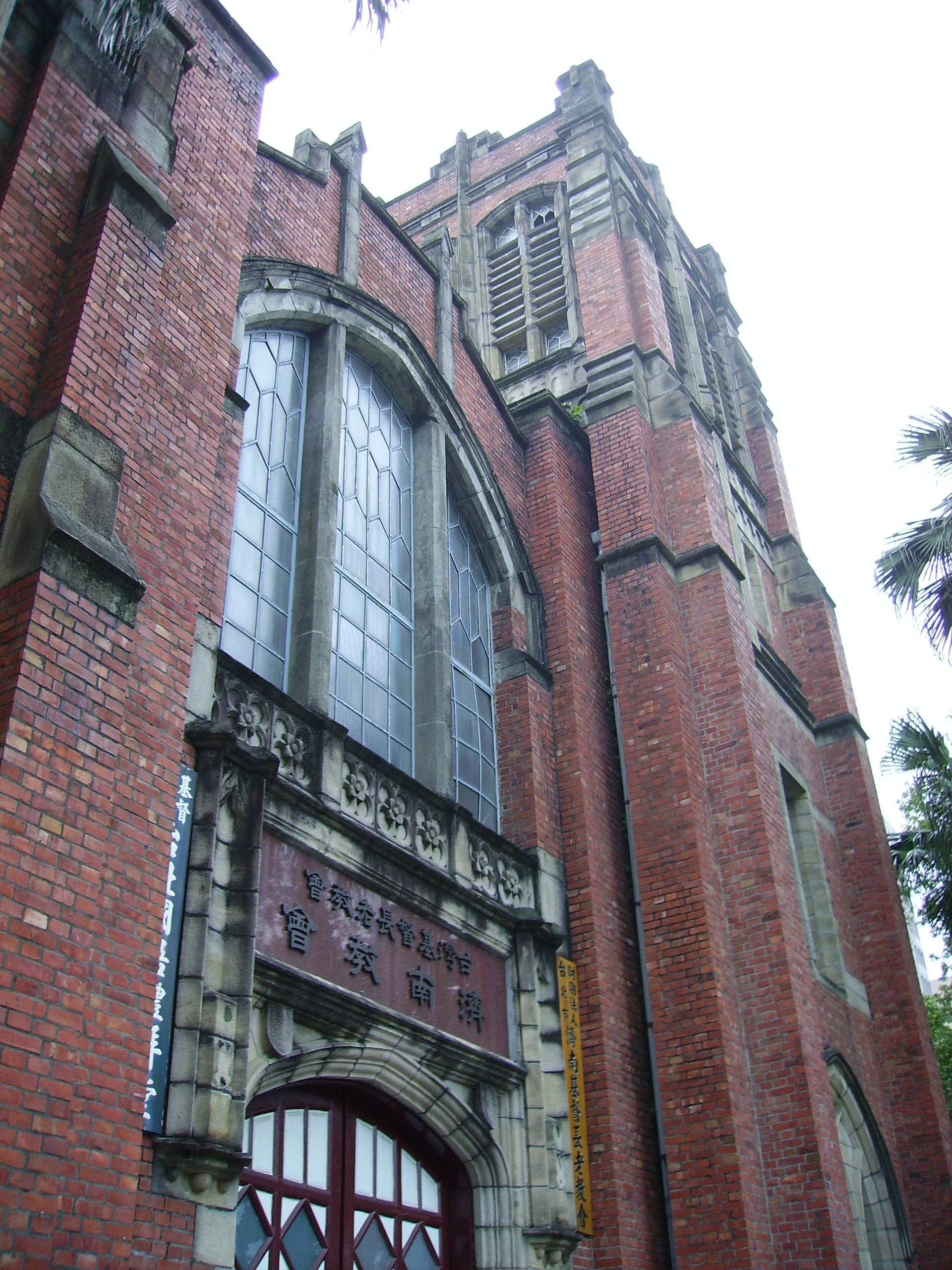 台灣基督長老教會濟南教會的尖塔。